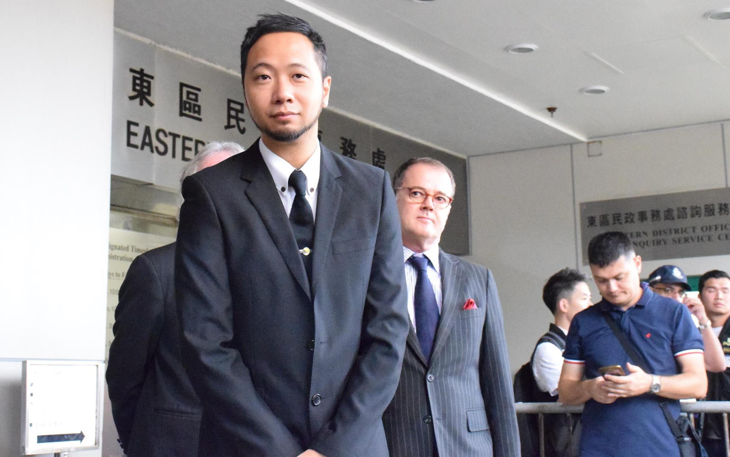 公民黨成員兼社工曾健超準備進入法院應訊